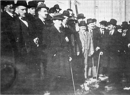 I Asemblea Nacionalista, Lugo 17-18 de novembro de 1918, aparecen, entre outros, Antón Losada Diéguez, Antón Villar Ponte, Vicente Risco e Manuel Banet Fontenla.jpg